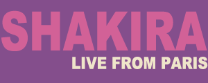 Logo a base de la tipografía que figura en la carátula oficial de Shakira Live from Paris